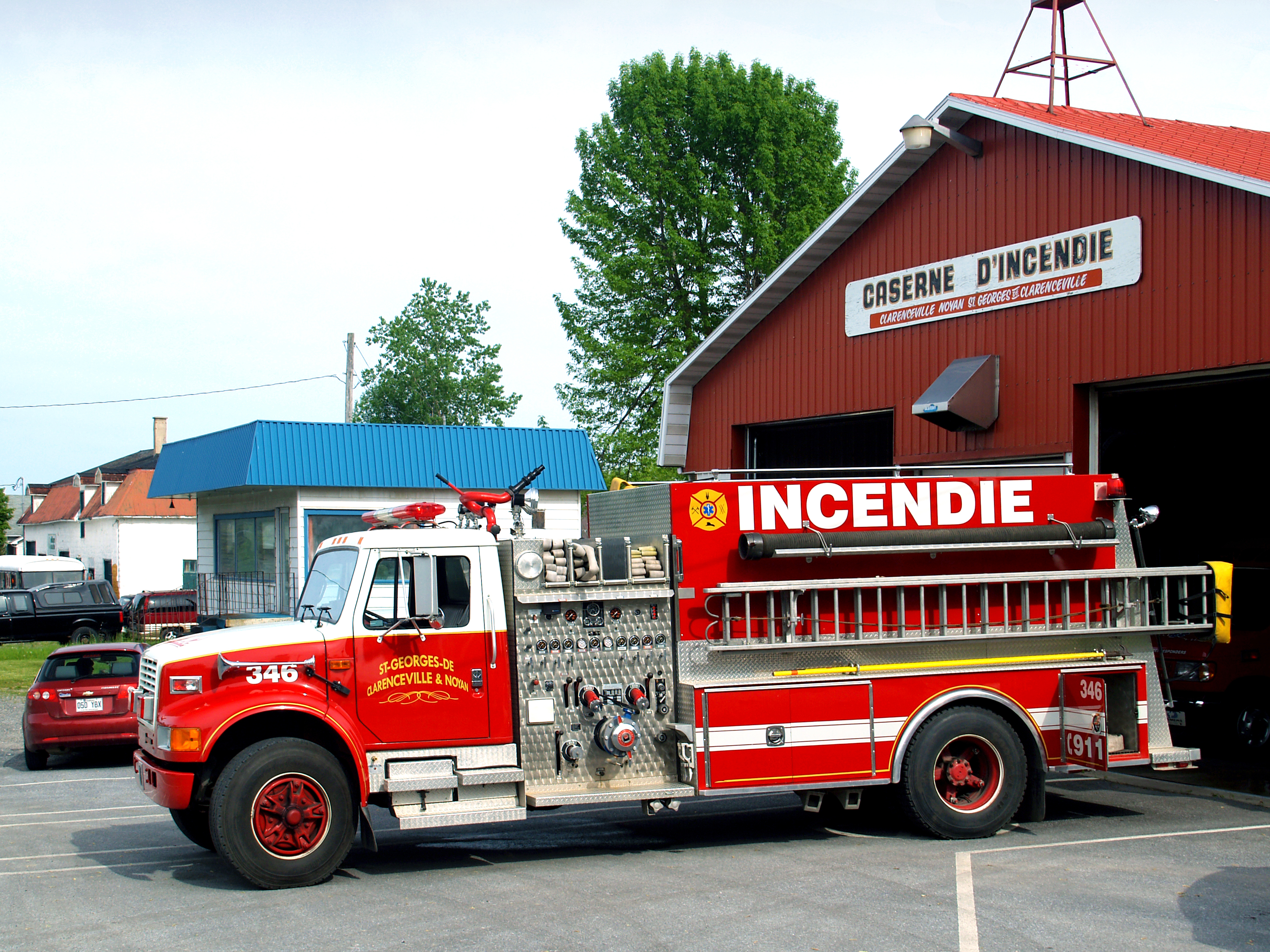 Saint-Georges-de-Clarenceville (Québec) - Caserne d'incendie